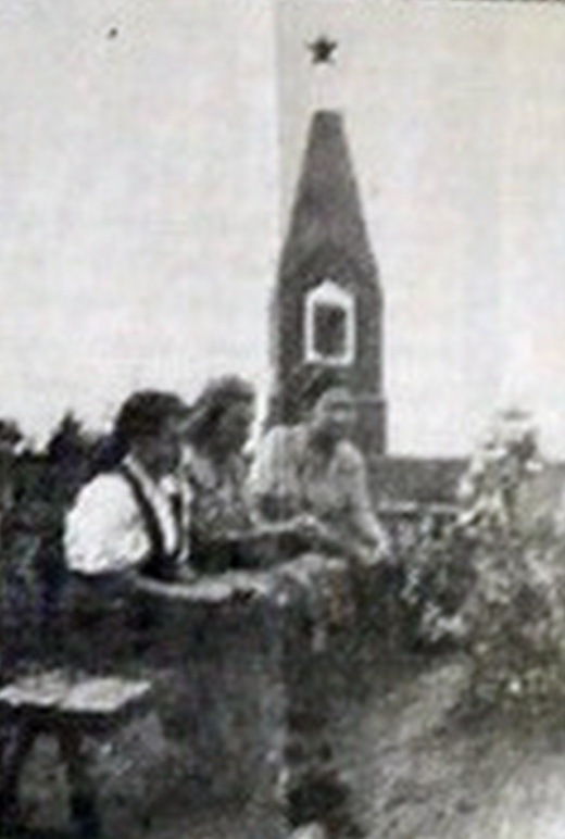 Памятник на братской могиле хутора Весёлый Веселовского района Ростовской области, 1950-е годы